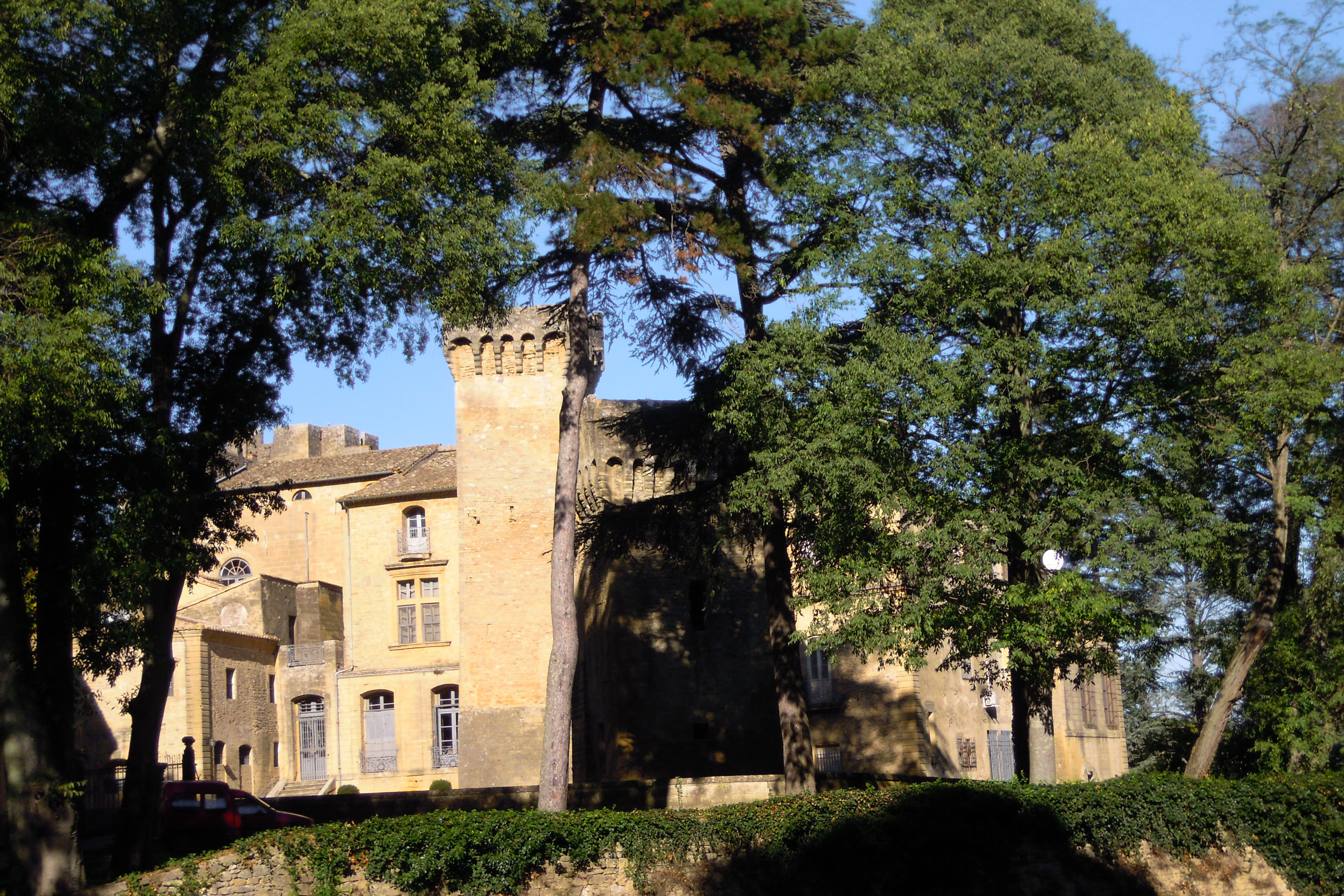 Cour du Château de St Privat .